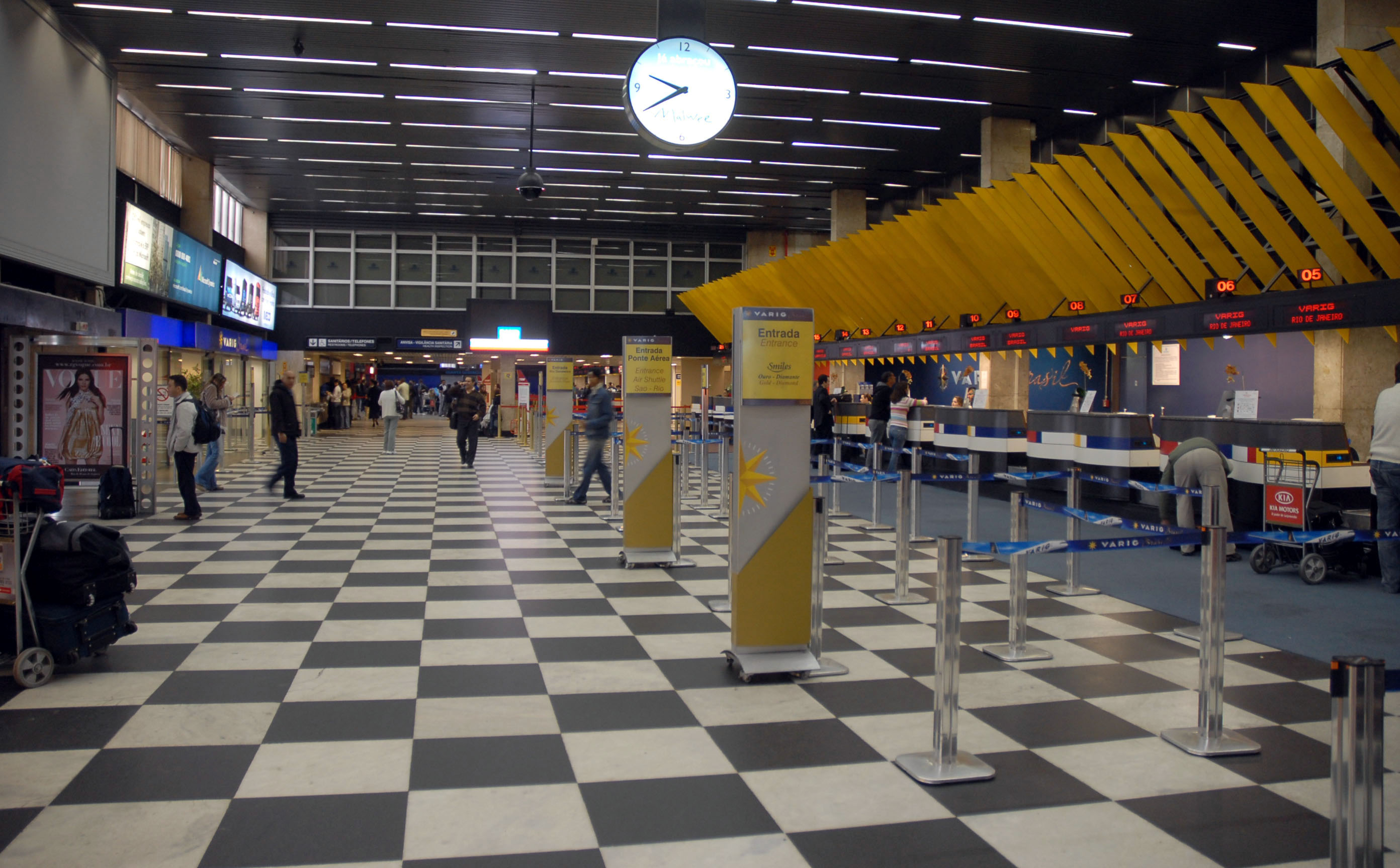 imagem do Aeroporto de Congonhas